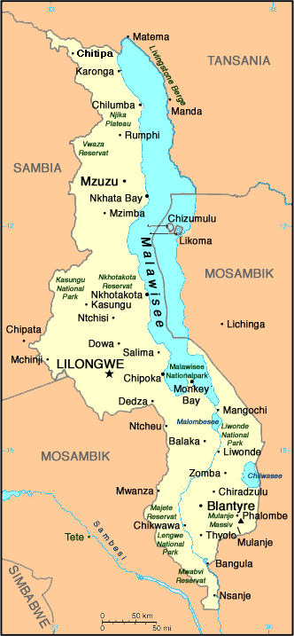 eigene Modifikation der bestehenden Malawikarte